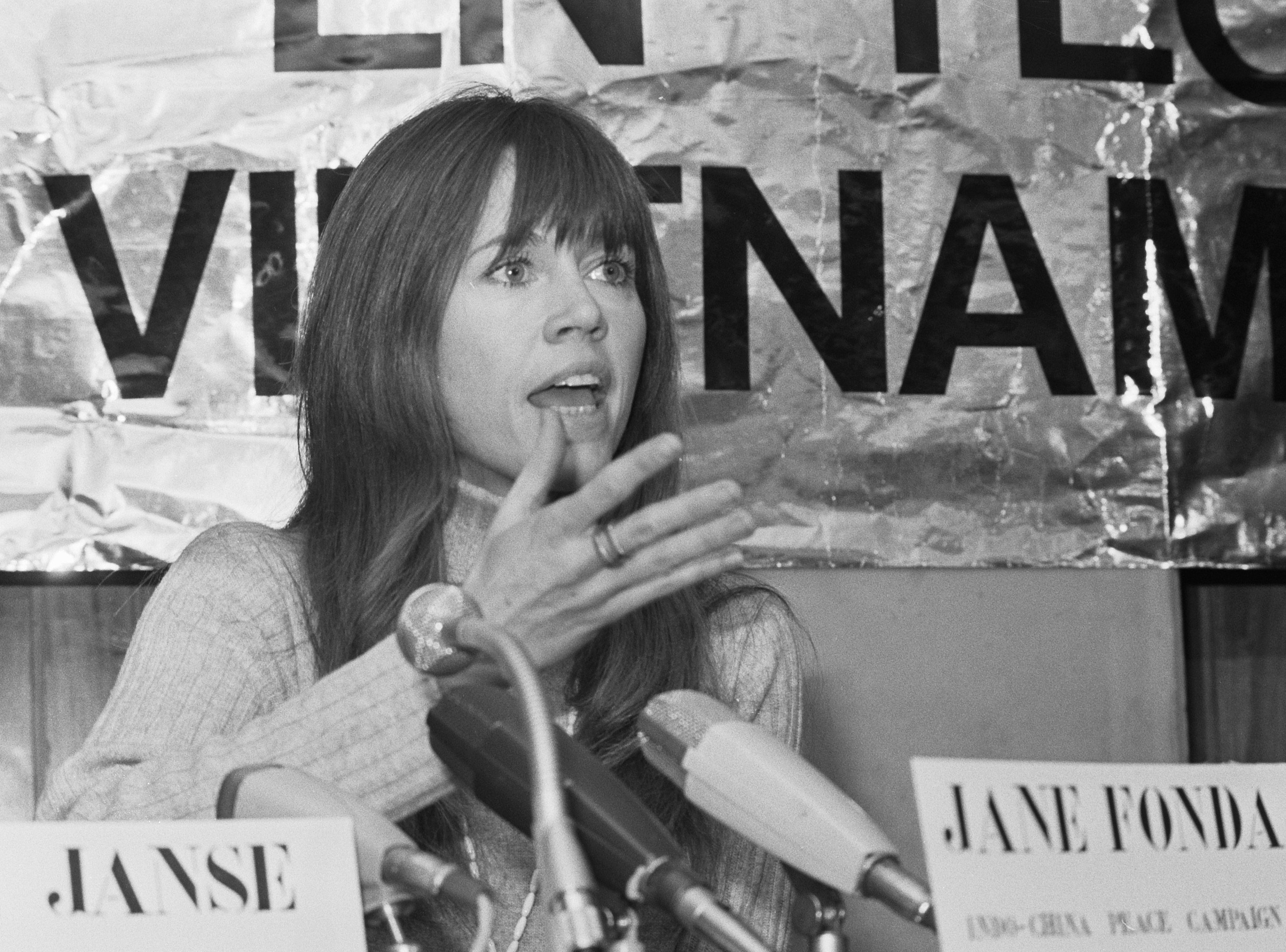 Jane Fonda geeft persconferentie in TH in Delft voor Vietnamacties; Jane Fonda tijdens persconferentie